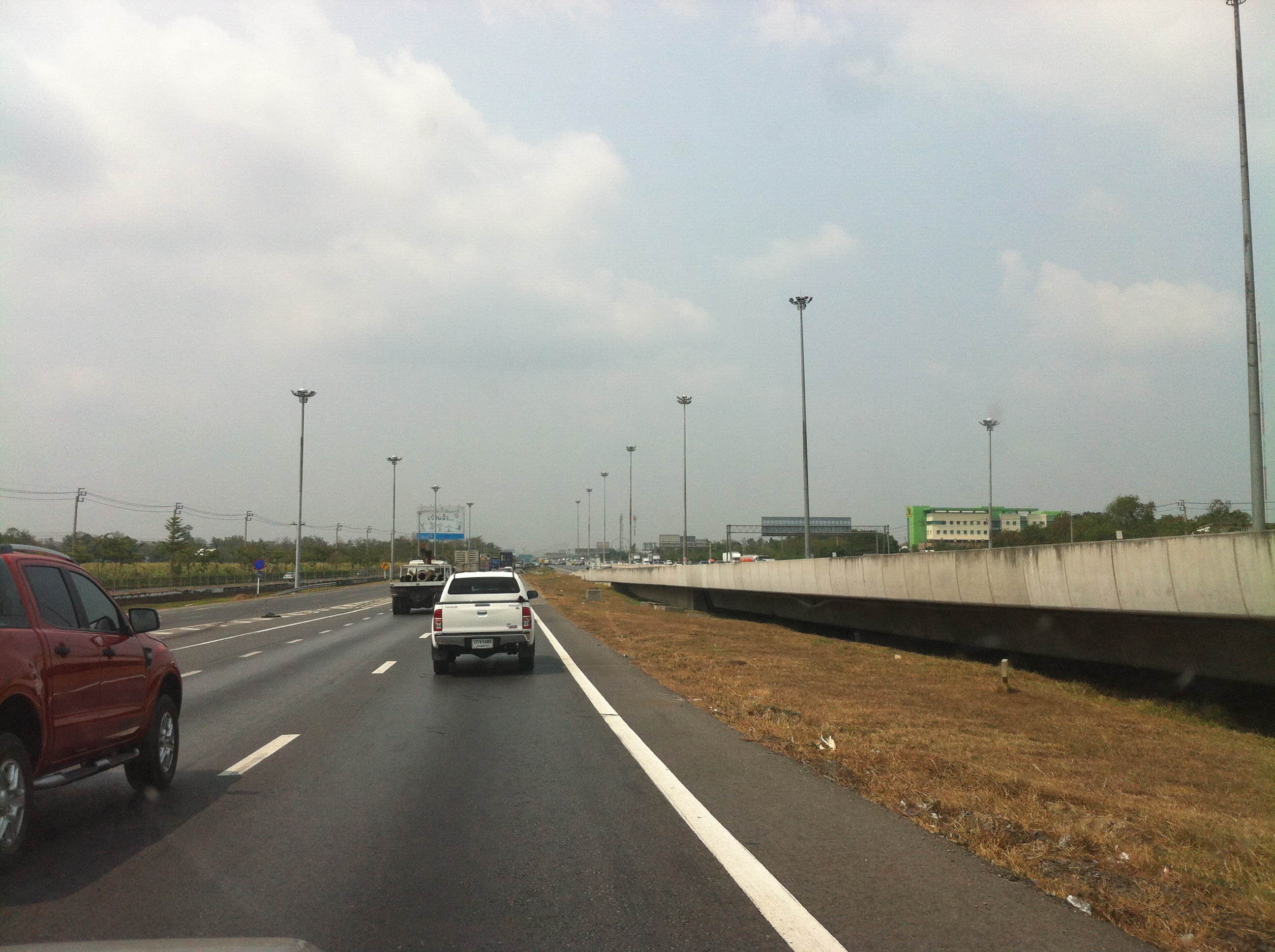 Ram Inthra, Khan Na Yao, Bangkok 10230, Thailand